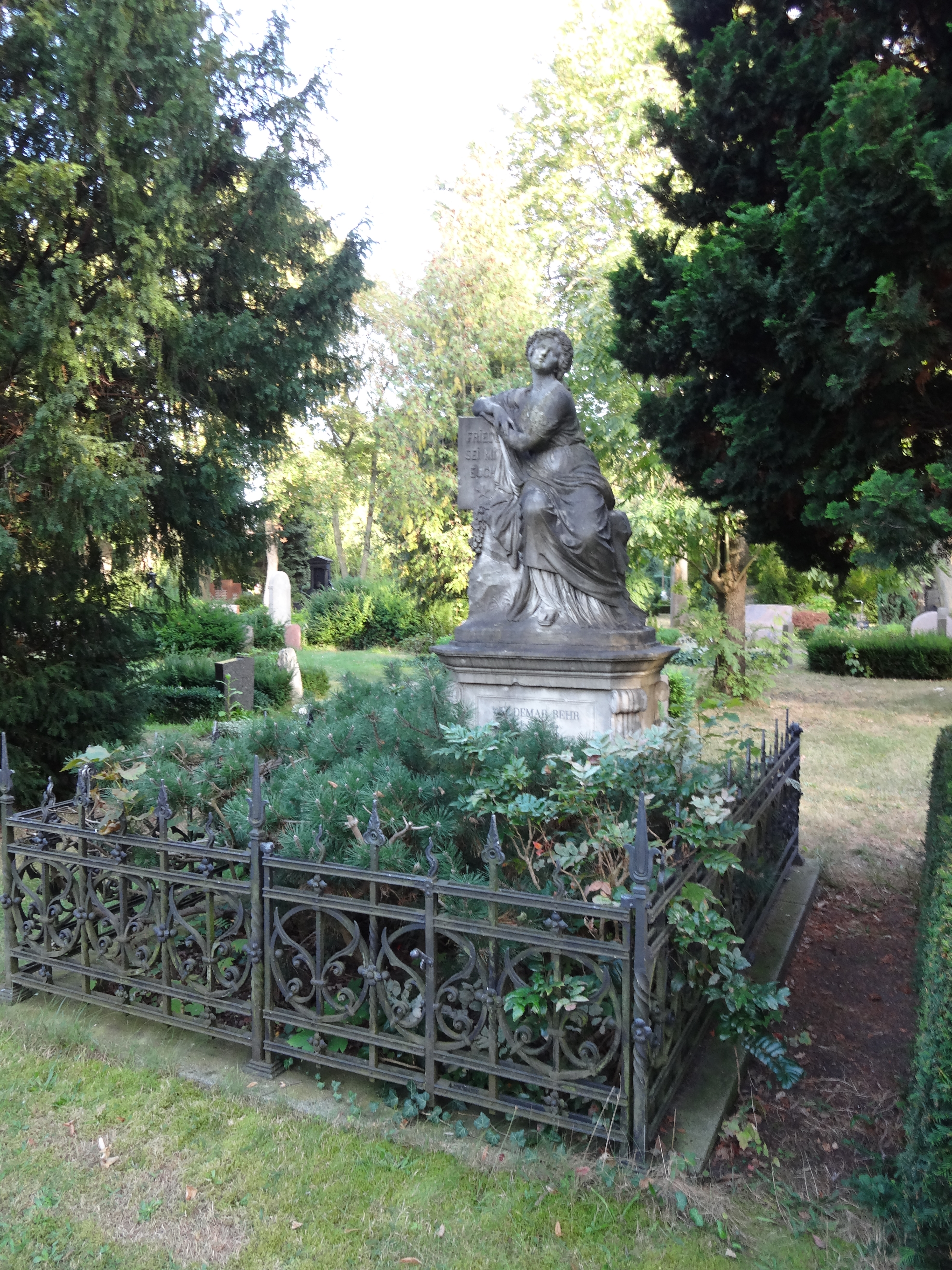 Grab von Waldemar Behr auf dem Dorotheenstädtischen Friedhof II in der Liesenstraße in Berlin